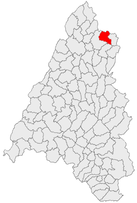 Categorie:Hărţi ale judeţului Bihor